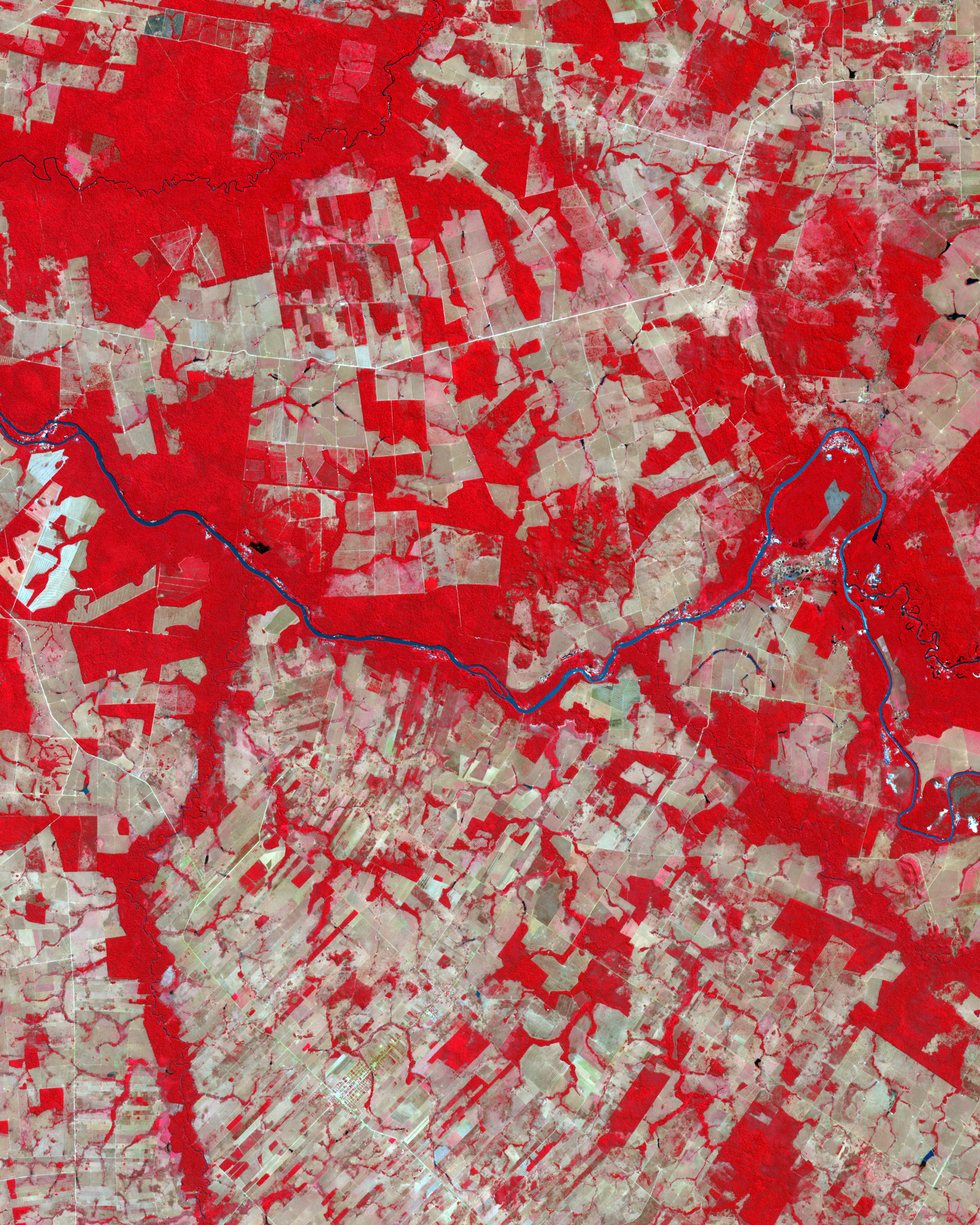 Deforestation in Mato Grosso, Brazil -- 2006